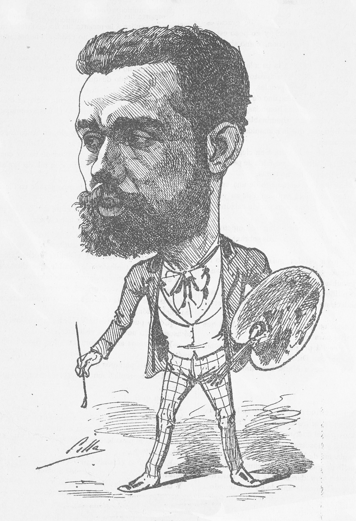 Manuel Domínguez Sánchez.